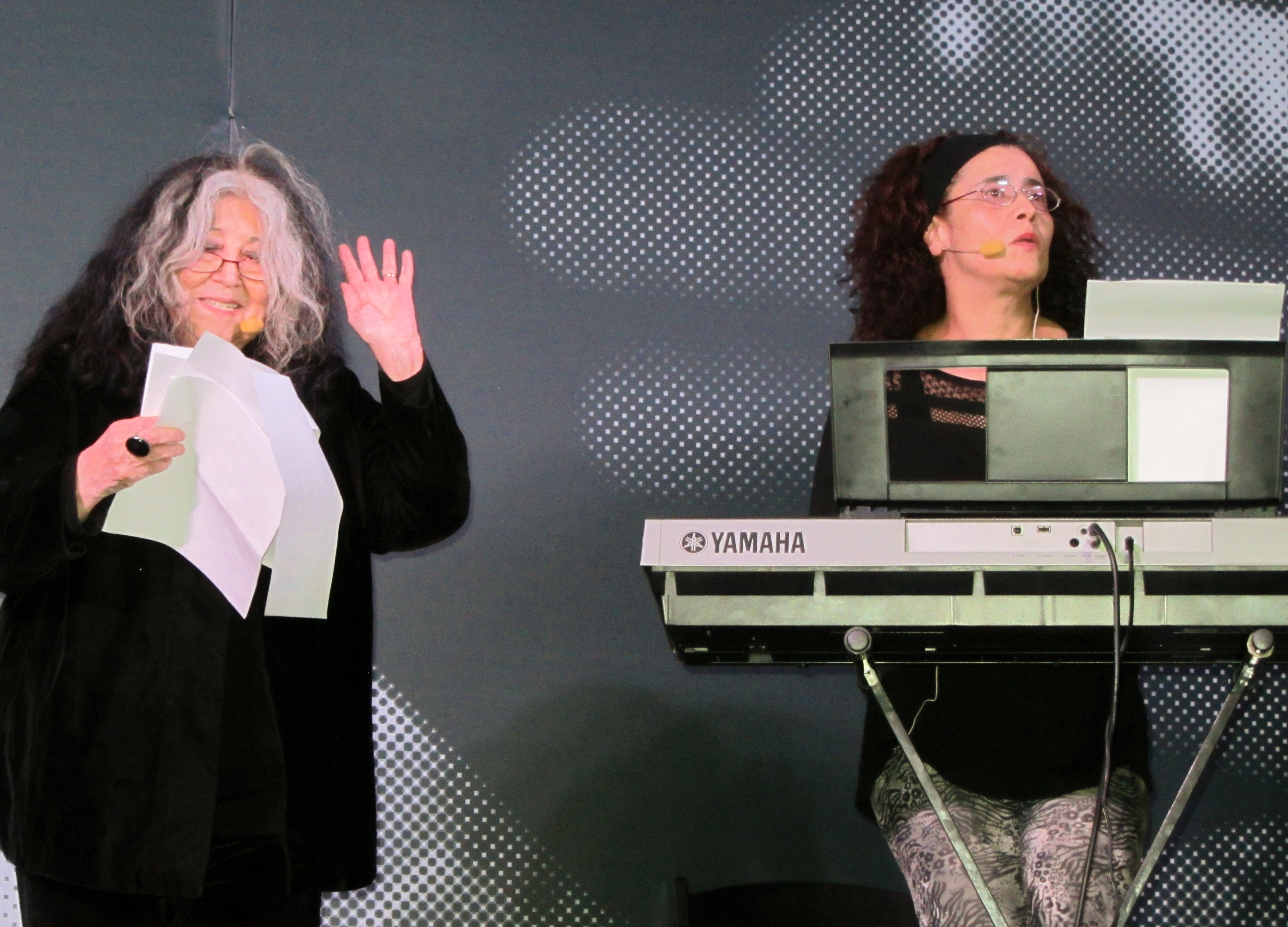 La poeta chilena Carmen Berenguer durante un recital con la música Carolina Jerez en la Feria Internacional del Libro de Santiago 2015